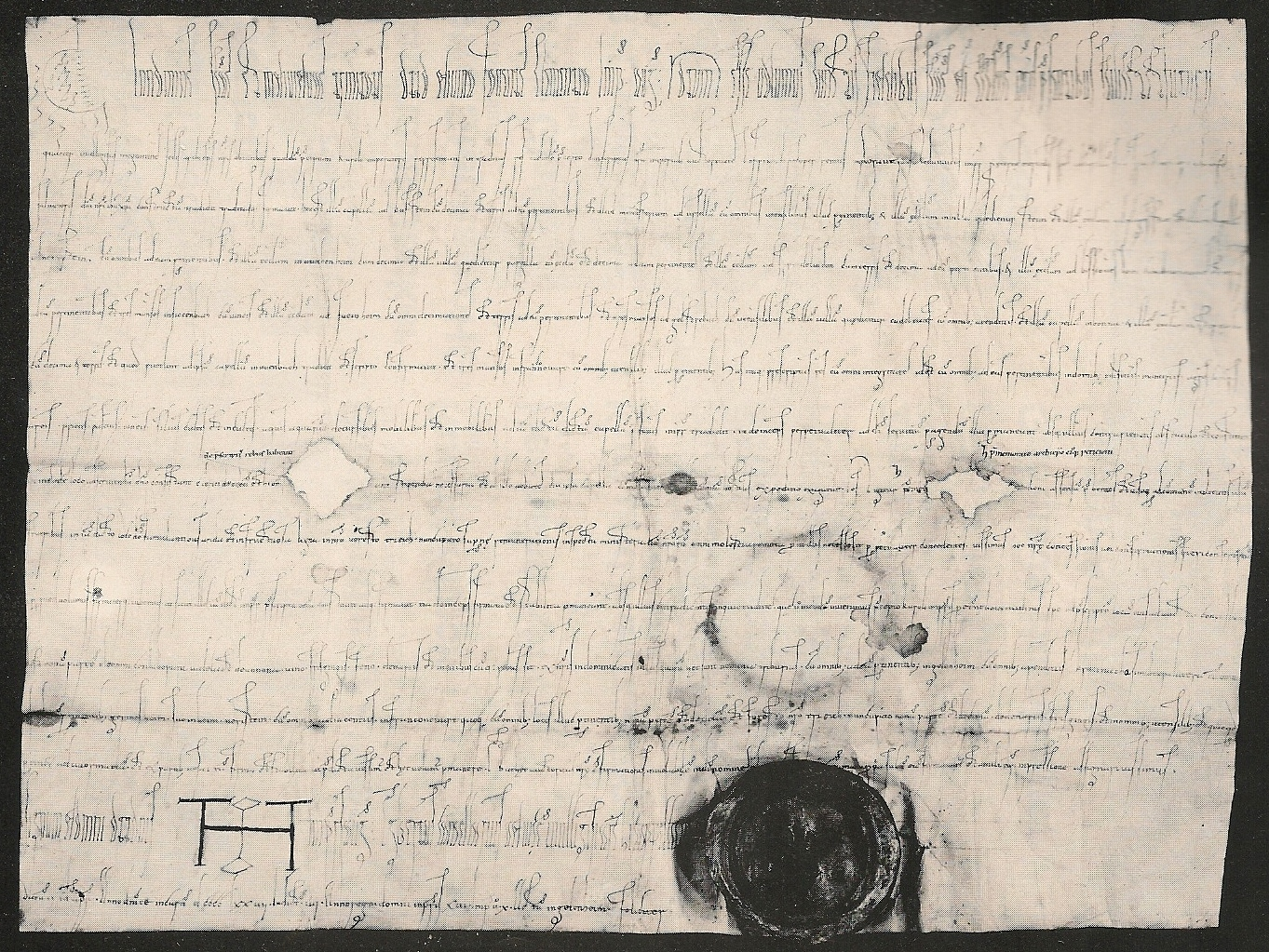 Die Kaiserurkunde ist von Kaiser Otto II. am 12. April 977 in lateinischer Sprache verfasst und ist die erste urkundliche Erwähnung von "Ovenbach", dem heutigen Ohmbach.